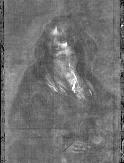 Portrait of Isabel de Porcel by Goya, X-ray revealing another woman's portrait underneath.